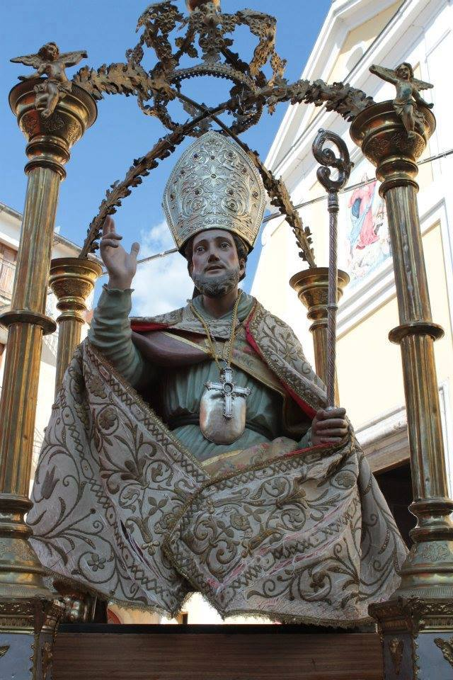 Questa statua si trova nella Parrocchia Santa Maria Assunta di San Salvatore Telesino.